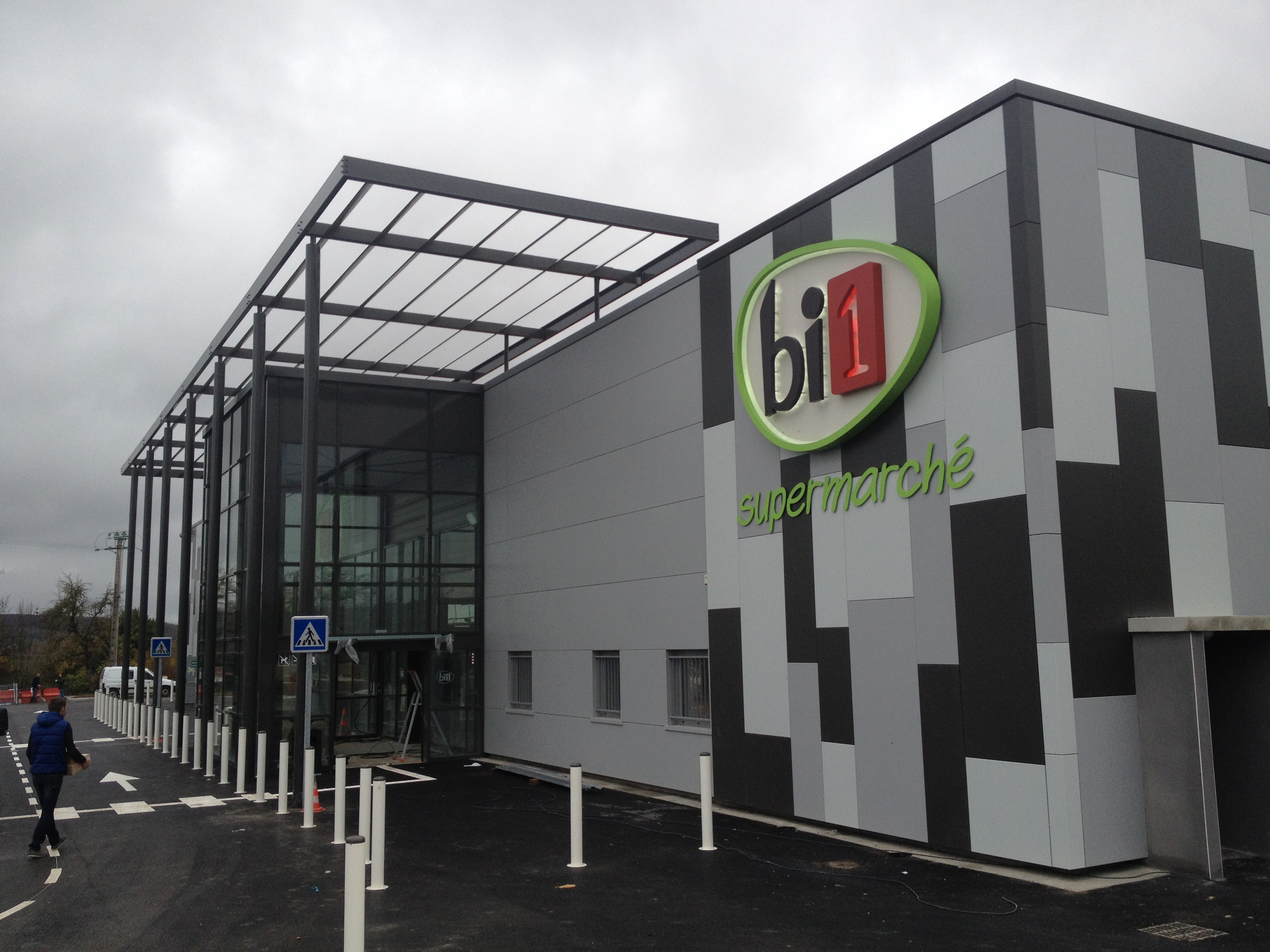 bi1 Aillant-sur-tholon